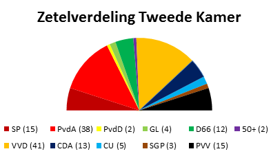 Zetelverdeling Tweede Kamer 2012.